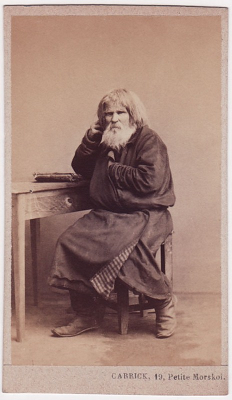 Cерия открыток с жителями Российской империи, которую сделали живущие в Москве и Санкт-Петербурге фотографы